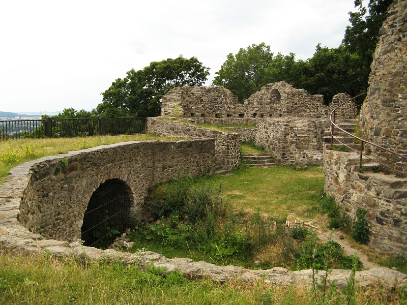 Hrad Krupka (Rosenberg), zřícenina (Krupka), Krupka